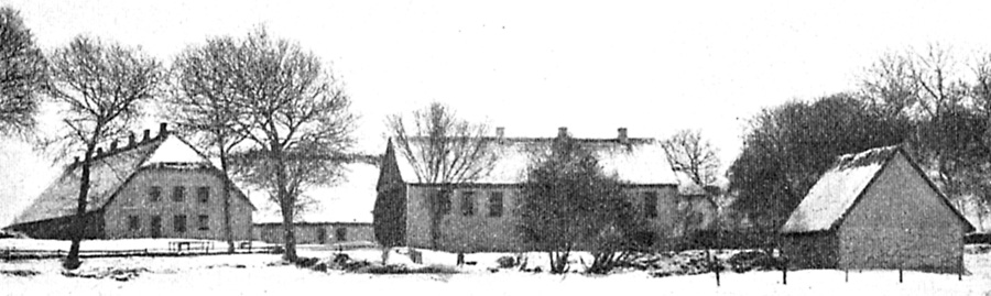 Lykkesholm er en lille sædegård, som nævnes første gang i 1457. Gården ligger i Tryggelev Sogn, Langelands Sønder Herred, Sydlangeland Kommune. Hovedbygningen er opført i 1800.